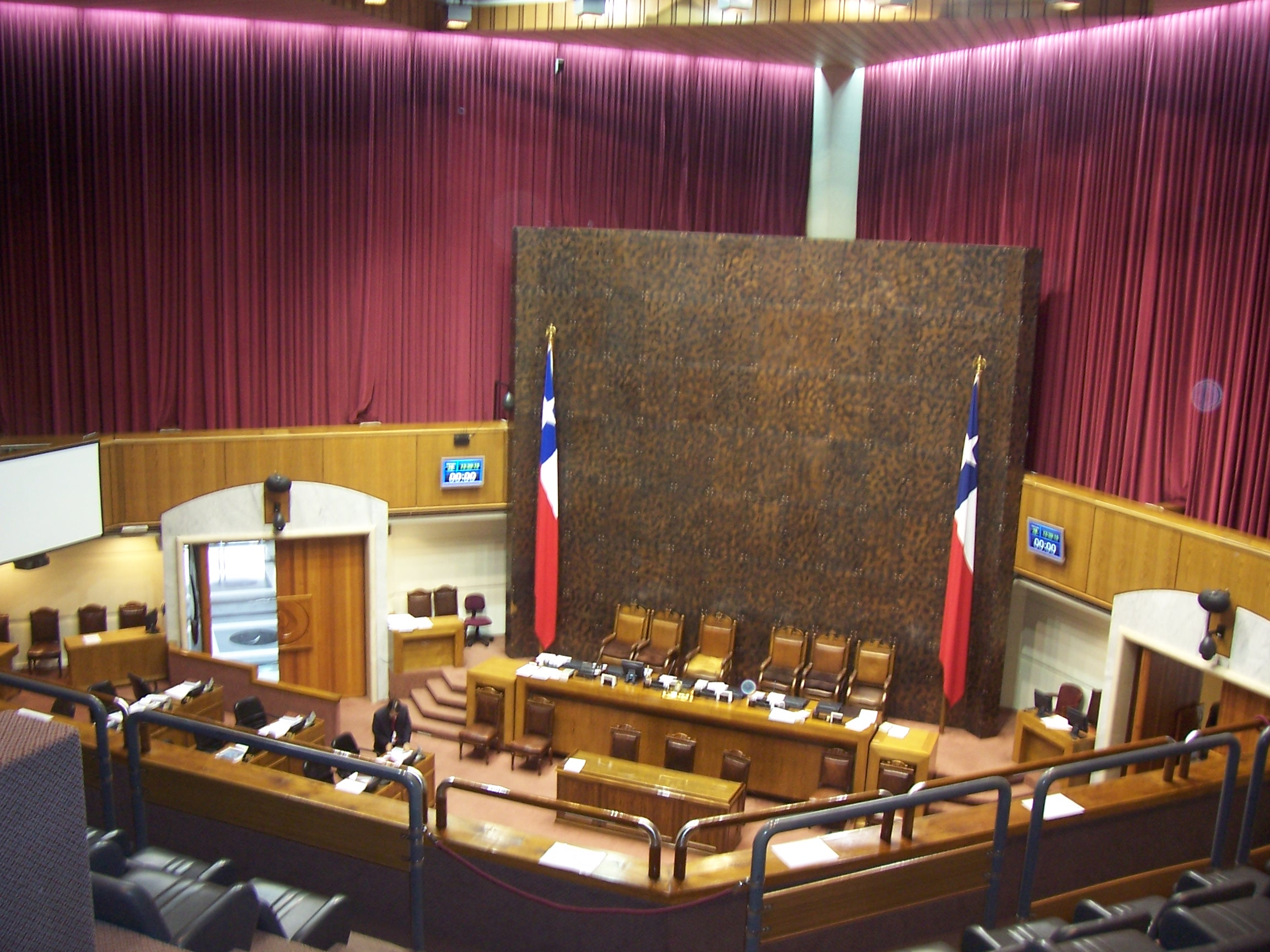 La Cámara de Senadores del Congreso Nacional de Chile en Valparaíso.